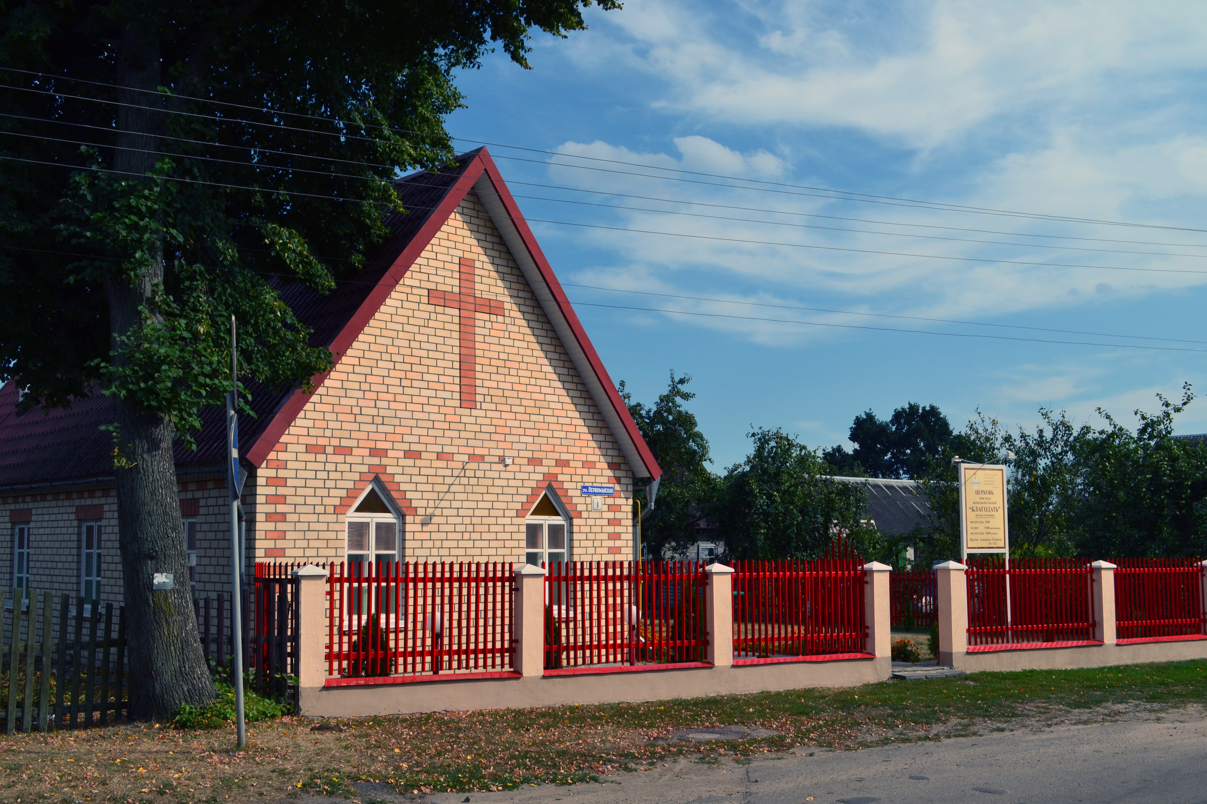 Першамайскай, 1.